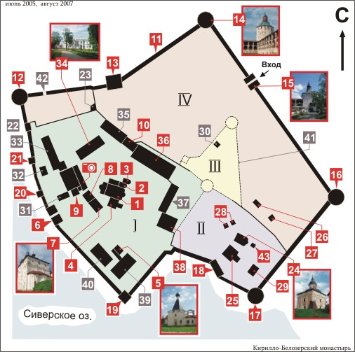 I. Успенский монастырь II. Ивановский монастырь III. Острог IV. Новый город. 1 - Успенский собор (1496 г.); 2 - Церковь Владимира (1554 г.); 3 - Церковь Епифания (1645 г.); 4 - Церковь Кирилла (1781-1784 гг.); 5 - Церковь Евфимия (1646 г.); 6 - Преображенская церковь над Водяными воротами (1595 г.); 7 - Церковь Архангела Гавриила (1531-1534 гг.); 8 - Колокольня (1757-1761 гг.); 9 - Введенская церковь с трапезной (1519 г.); 10 - Церковь Иоанна Лествичника (1523, 1569-1572 гг.); 11 - Ограда монастыря (XVI-XVII вв.); 12 - Большая Мереженная (Белозерская) башня (1660-е гг.); 13 - Косая башня (1660-е гг.); 14 - Ферапонтовская (Московская) башня (1660 г.); 15 - Казанская башня (1659 г.); 16 - Вологодская башня (1656 г.); 17 - Кузнечная башня (1670-е гг.); 18 - Глухая башня (конец XVI в.); 19 - Свиточная башня (конец XVI в.); 20 - Хлебенная башня (XVII в.); 21 - Поваренная башня (1761 г.); 22 - Малая Мереженная башня (конец XVI в.); 23 - Грановитая башня (конец XVI в.); 24 - Церковь Иоанна Предтечи (1531-1534 гг.); 25 - Церковь Сергия Радонежского (1560 г.); 26 - Ризположенская церковь из с.Бородава (1484 г.); 27 - Мельница из д.Горка (XIX в.); 28 - Часовни (кон. XVIII в.); 29 - Малая больничная палата (1730-е гг.); 30 - Остатки Солодеженной палаты (1570-е гг.); 31 - Келарский корпус (конец XVII в.); 32 - Поваренные кельи (1680-е гг.); 33 - Поварня (XVI в.); 34 - Настоятельский корпус (1647-1648 гг., кон. XVII в., 1821 г.); 35 - Казенная палата (XVI-XVII вв.); 36 - Монашеские кельи. Северный корпус. (2-я пол. XVII - нач. XVIII вв.); 37 - Священнические кельи. Восточный корпус (конец XVII в.); 38 - Кельи. Монастырский архив (кон. XVII в. - нач XVIII вв.); 39 - Большие больничные палаты (1643-1644 гг.); 40 - Кельи. Духовное училище (конец XVII в.); 41 - Стены и башни, разобранные после строительства Нового города; 42 - Троицкие ворота (1660-е гг.); 43 - Усыпальница Симоновых (кон. XIX в.)